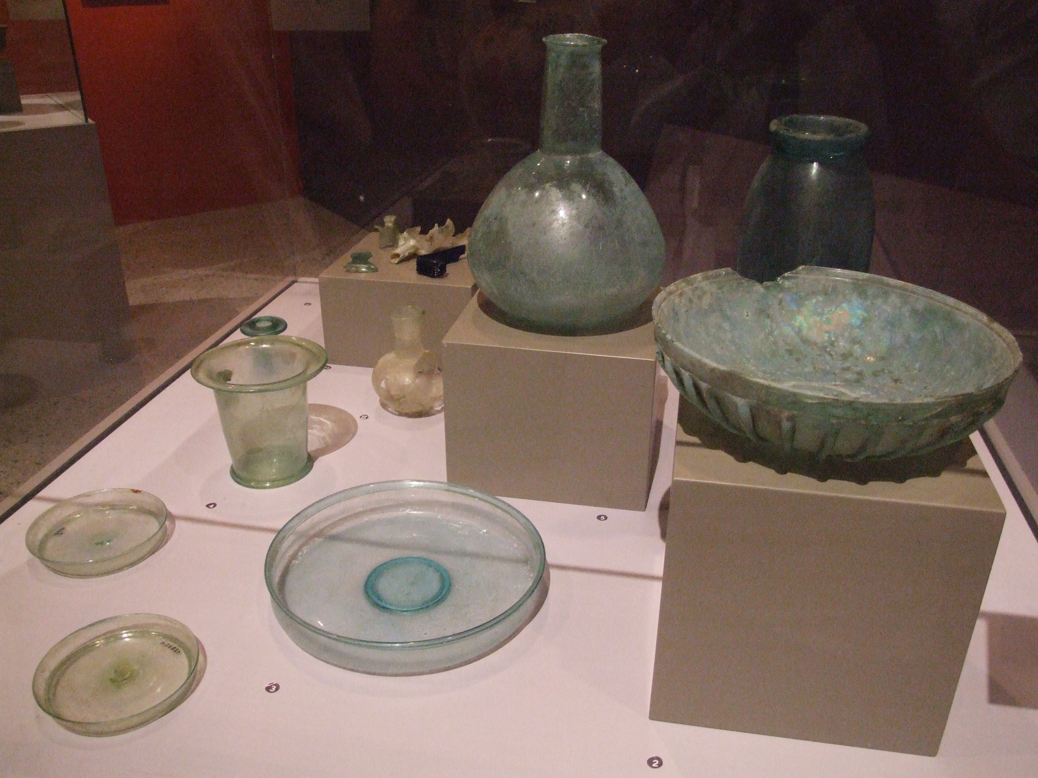 Römische Glaswaren aus Pompeii, 79 n.Chr.; Roman glassware from Pompeji; Pompeji-Ausstellung, Europäischer Kulturpark Bliesbruck-Rheinheim